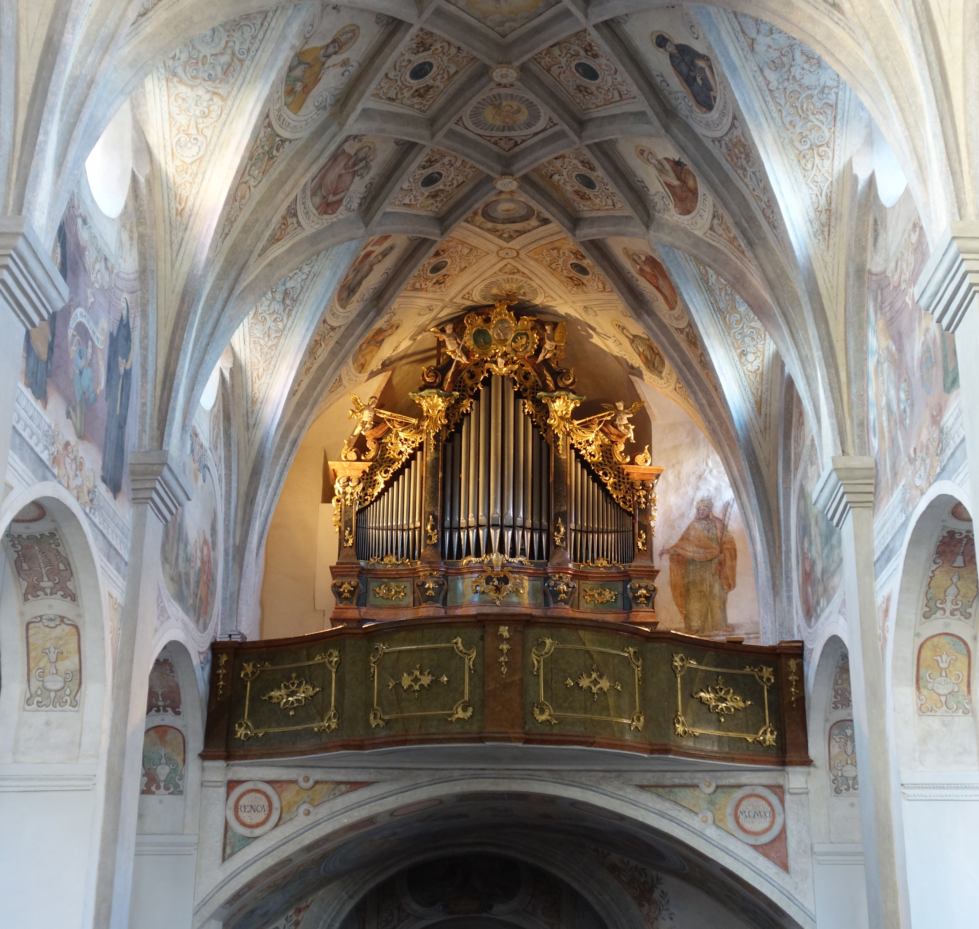 "Mozart-Orgel" im Kloster Seeon (1994, D. Schingnitz, II/21; Prospekt von der Orgel von Rochus Egedacher von ca. 1753)